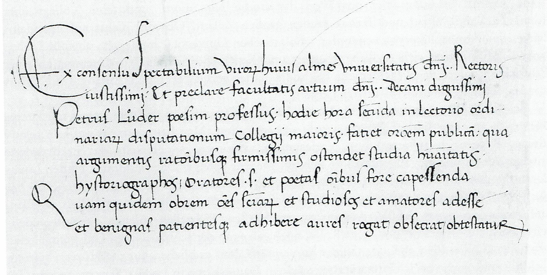 Eigenhändige Ankündigung der Leipziger Antrittsvorlesung Peter Luders München SB Clm 466 Bl. 485br. Text